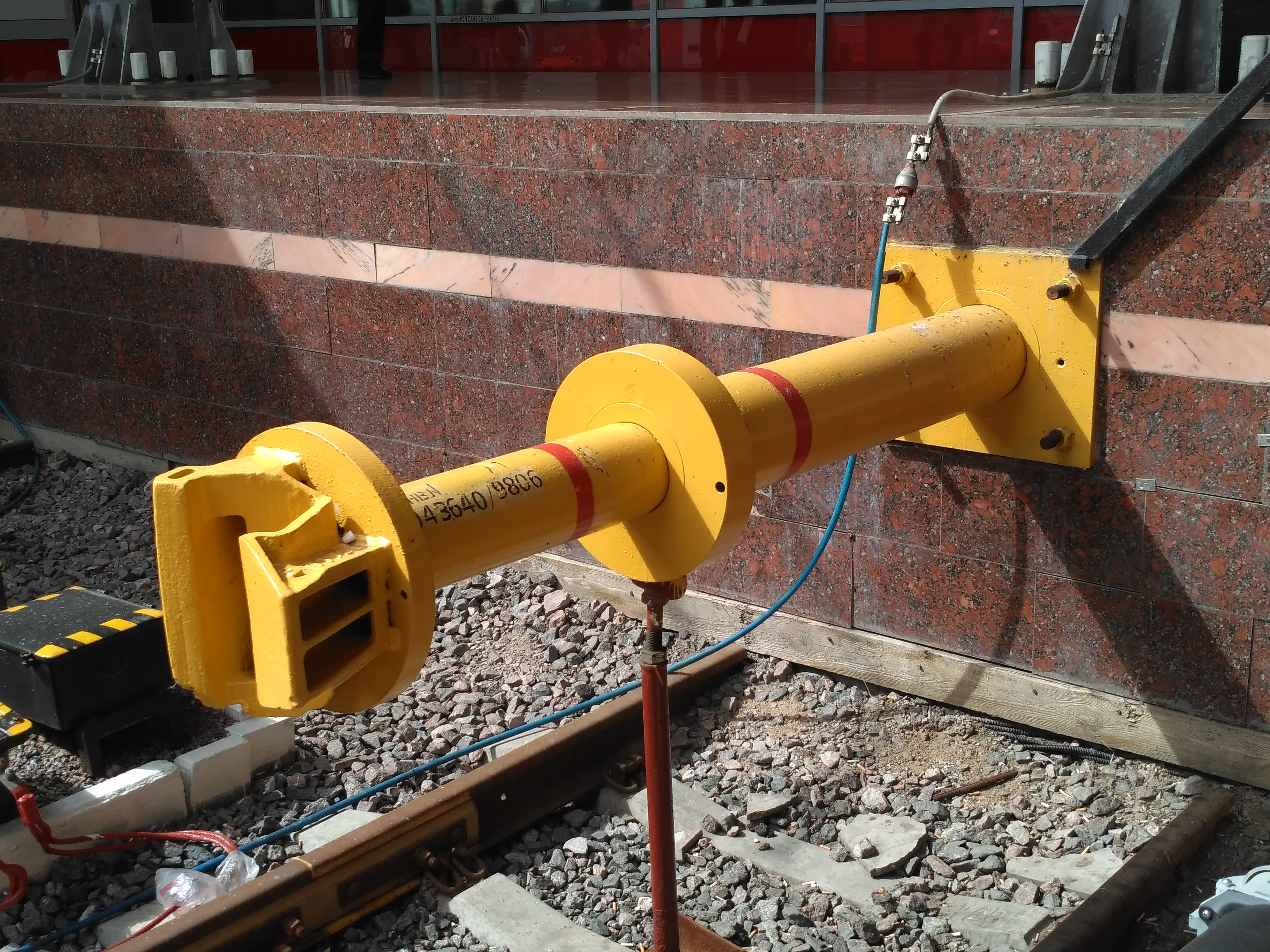 Путевой энергопоглощающий упор (ПЭУ), установленный на одном из путей Московского вокзала (Санкт-Петербург)